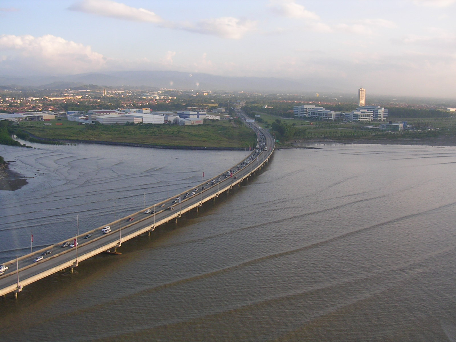 Vista erea del tramo marino del Corredor Sur en la Ciudad de Panamá